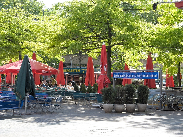 Bochum downtown - Berliner Platz Am Berliner Platz beginnt oder endet das Bermuda-Dreieck - je nachdem von welchem Standpunkt man blickt. Es ist Bochums berühmte Szene-Meile rund um den Engelbert-Brunnen am Adenauer Platz. Here starts the Bermuda Triangle. It is the popular name of the quarter around Graf-Engelbert Monument where Bochum's legendary "scene" is located.